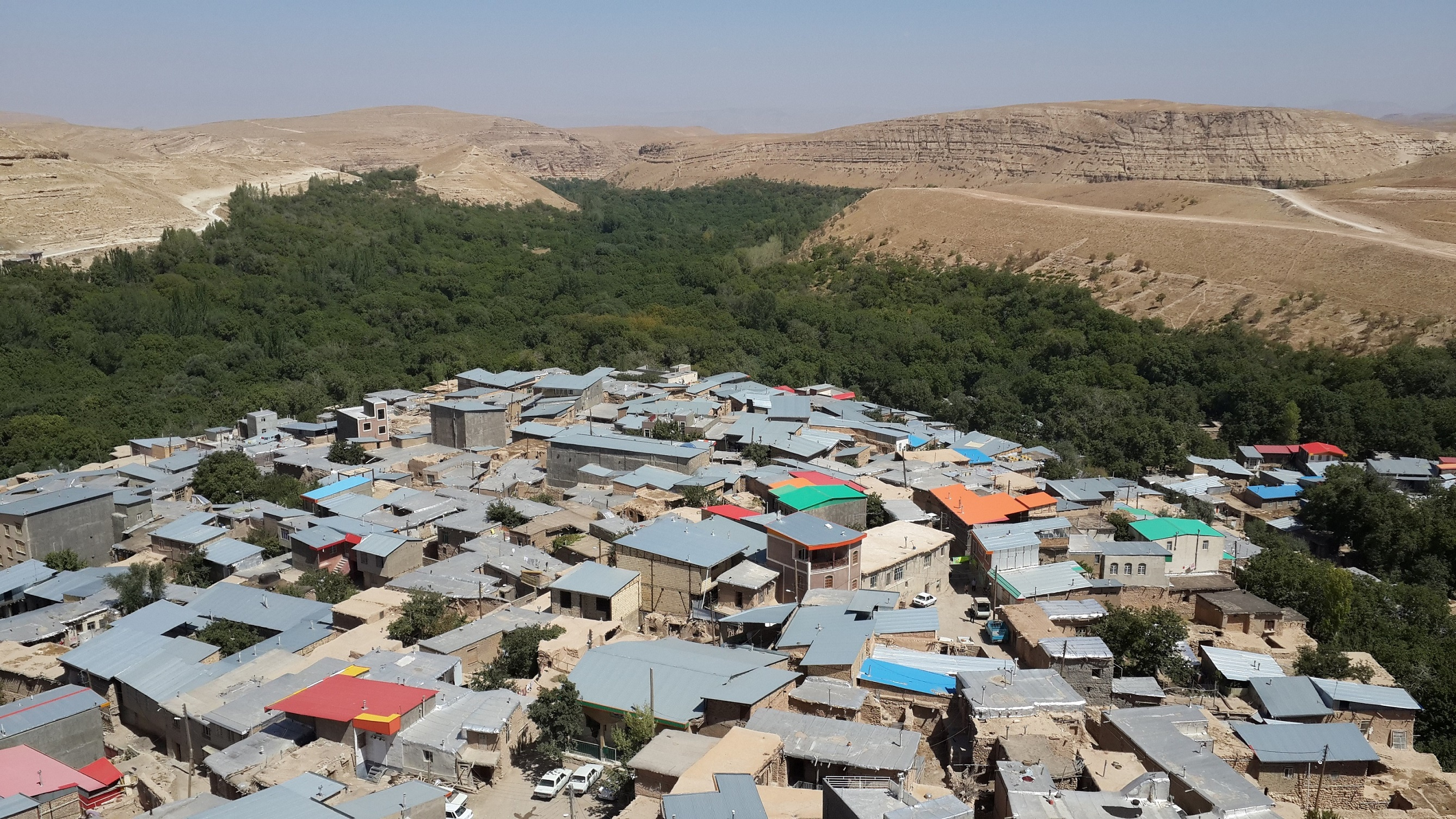 نمای از روستا و باغات گردشگری وفس